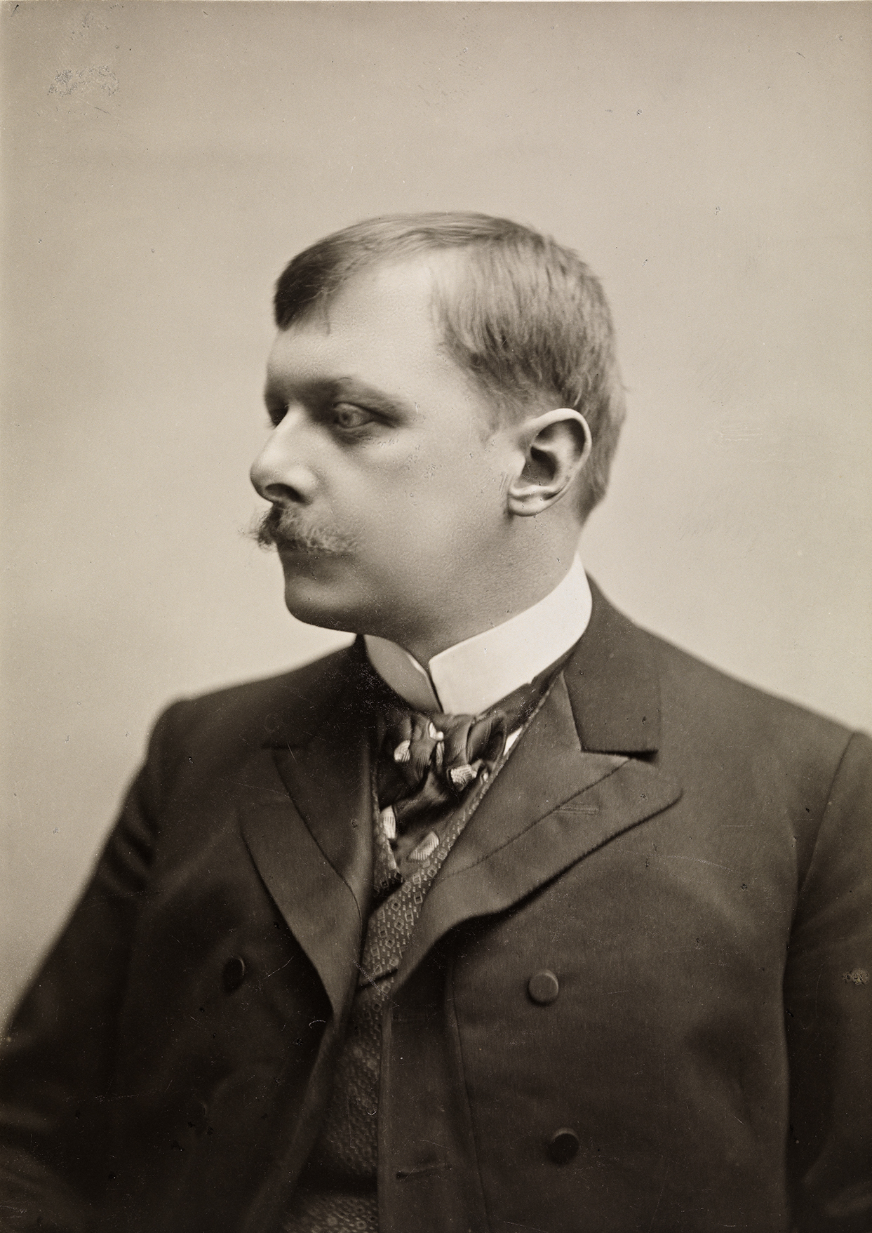 Tittel / Title: Portrett av Carl Størmer (1874-1957) Beskrivelse / Description: Kabinettkort / Cabinet card. Størmer var matematiker og nordlysforsker. Dato / Date: ukjent / unknown Fotograf / Photographer: L. Forbech (Christiania) Sted / Place: Oslo Eier / Owner Institution: Nasjonalbiblioteket / National Library of Norway Lenke / Link: Bildesignatur / Image Number: blds_02956